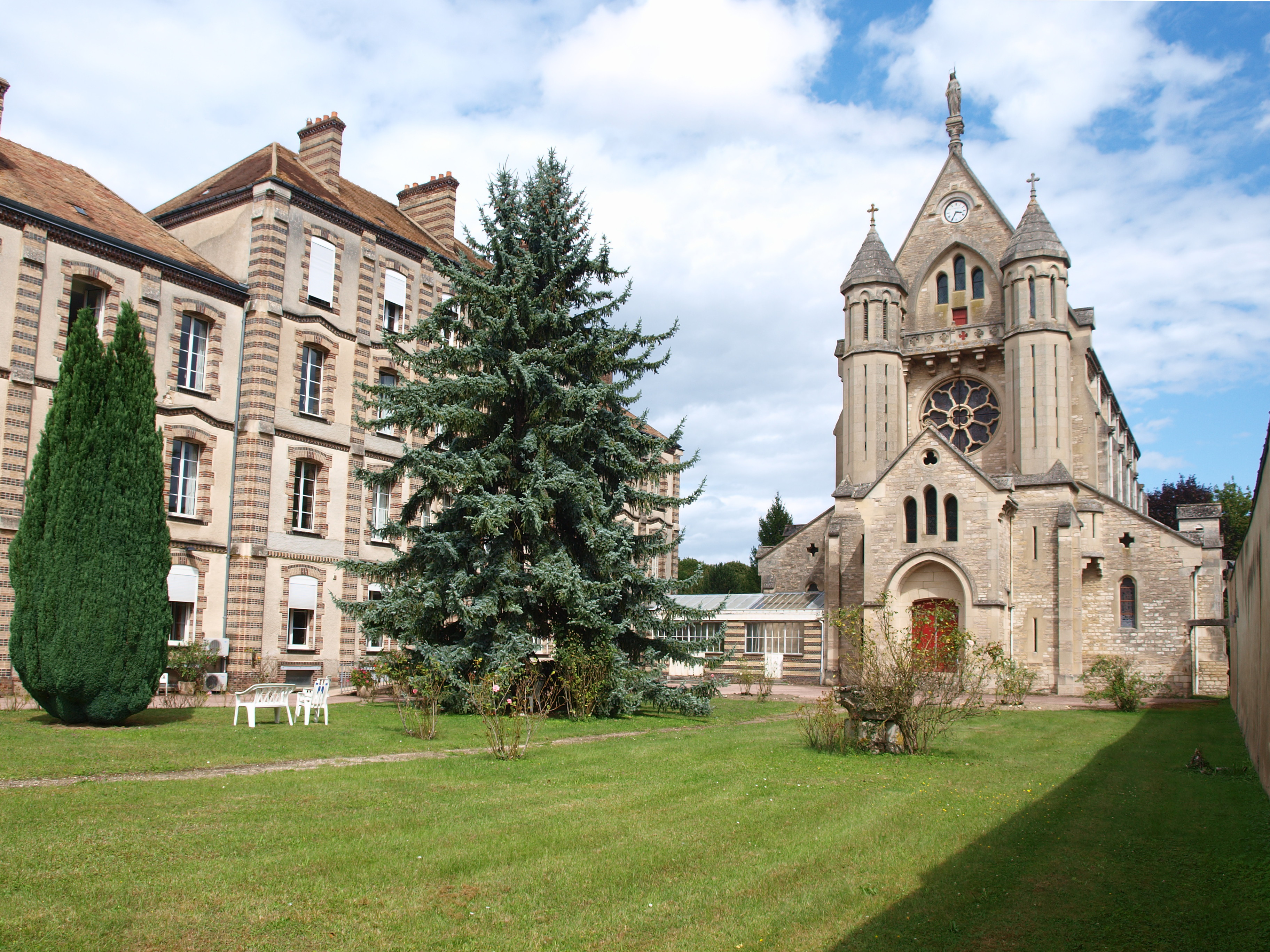 Abbaye Sainte-Colombe de Saint-Denis-lès-Sens (Yonne, France)